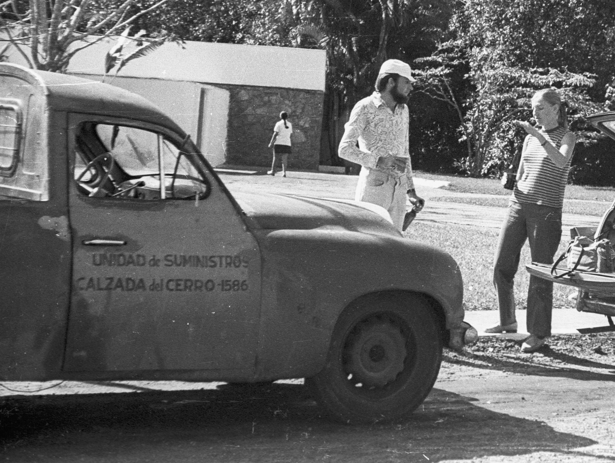 Pinar del Rio tartomány, Soroa Természetvédelmi terület. Location: Cuba Title: Pinar del Rio tartomány, Soroa Természetvédelmi terület.